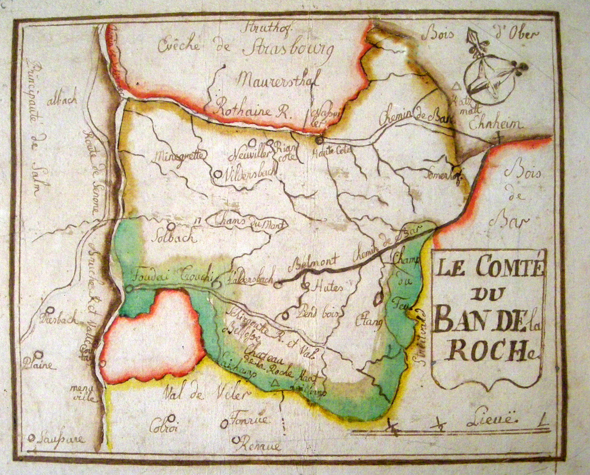 Carte du Ban-de-la-Roche. Gravure sur bois colorée à la gouache. Dédicacée par J.F. Oberlin aux demoiselles Witz en 1815. Il existe plusieurs tirages et variantes de cette carte mise au point par J.G. Stouber, le prédécesseur de J. F. Oberlin au Ban-de-la-Roche. Musée Jean-Frédéric Oberlin à Waldersbach (Bas-Rhin).